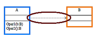 Imatge que descriu una dependència en un diagrama de classes UML.